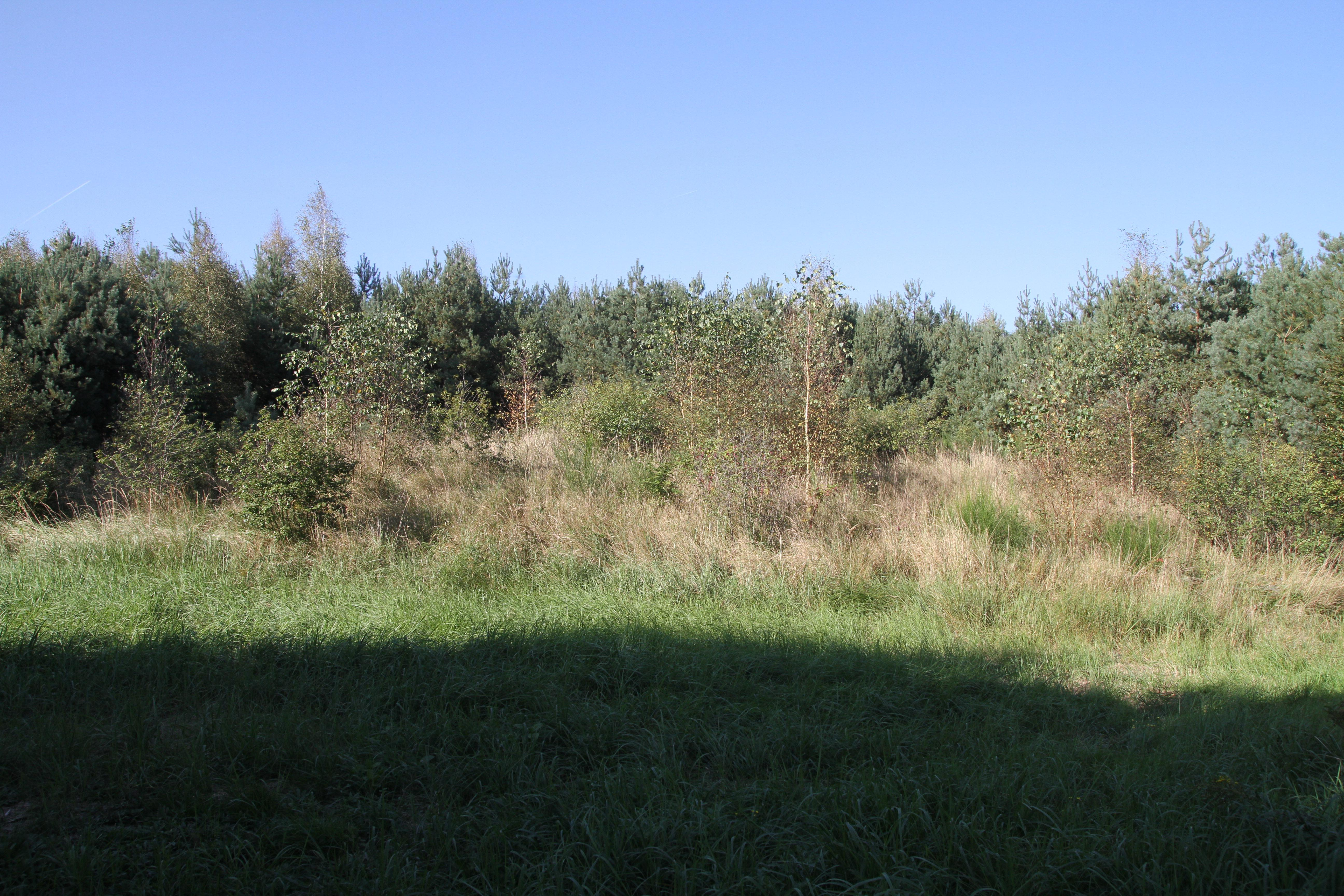 Ein zugewachsener Grabhügel des Seltzer Grabfeldes. Leider ist nicht mehr viel vom eigentlichen Hügelgrab zu sehen.